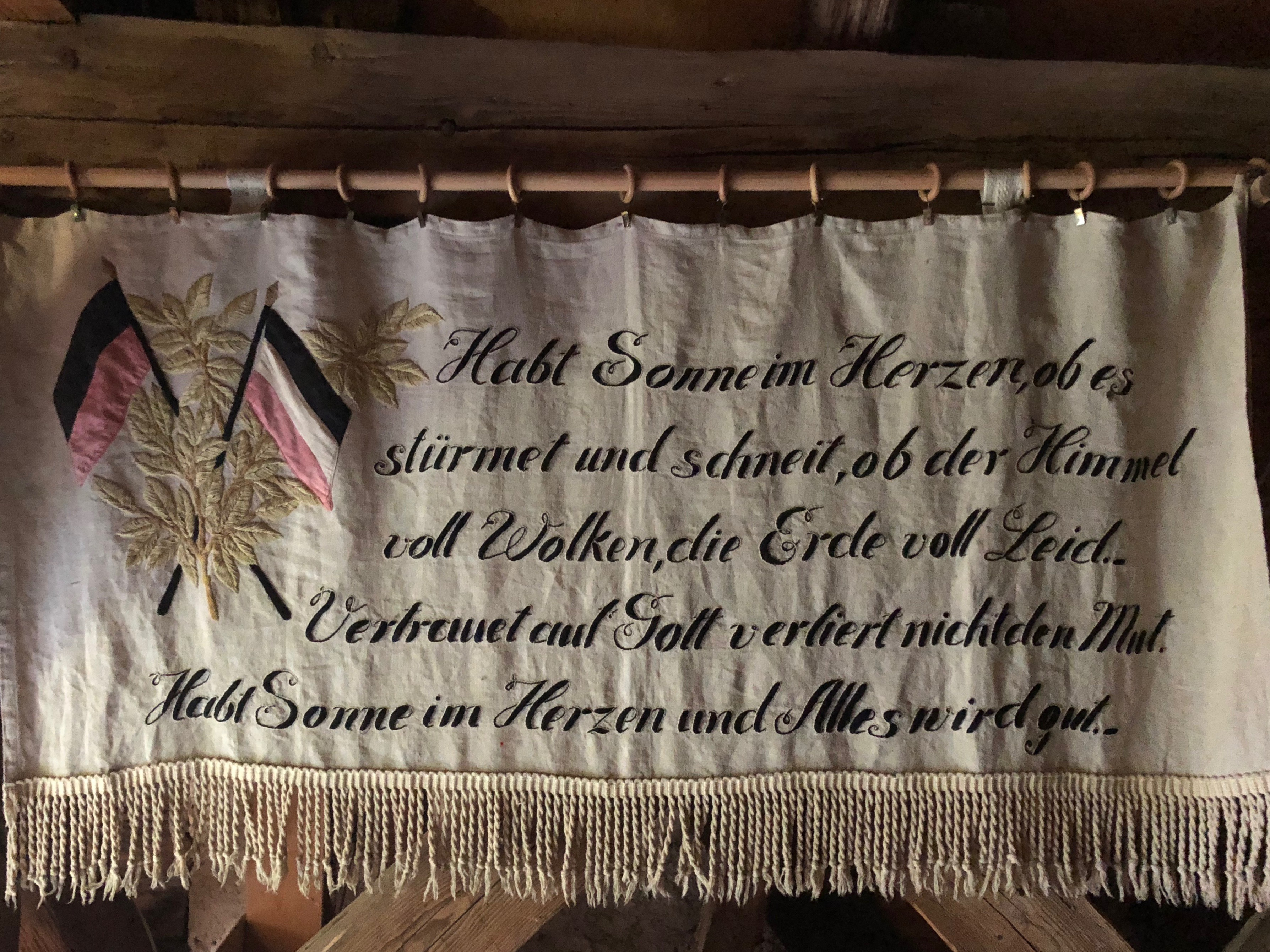 Gedicht von Cäsar Flaischlen